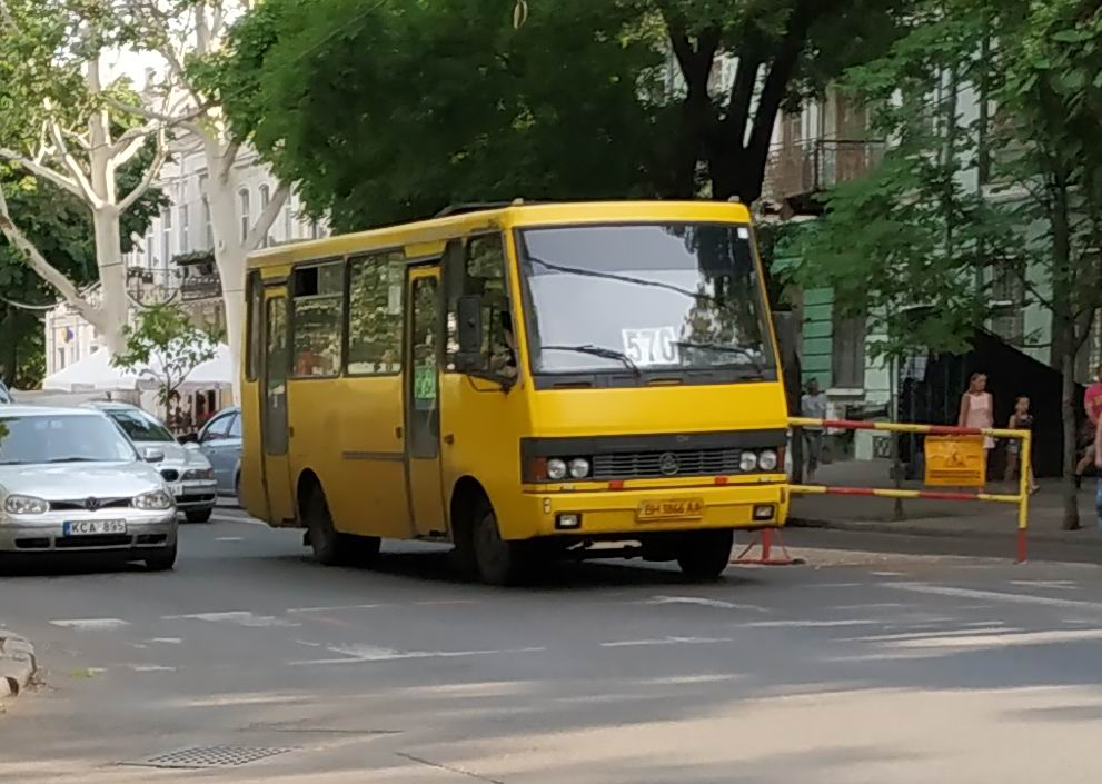 Автобус БАЗ А079.14 "Эталон". Вариант с круглыми фарами. Одесса, июнь 2019 г.